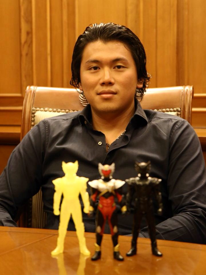 Reino Ramaputra Barack, tokoh pencipta serial Bima Satria Garuda.